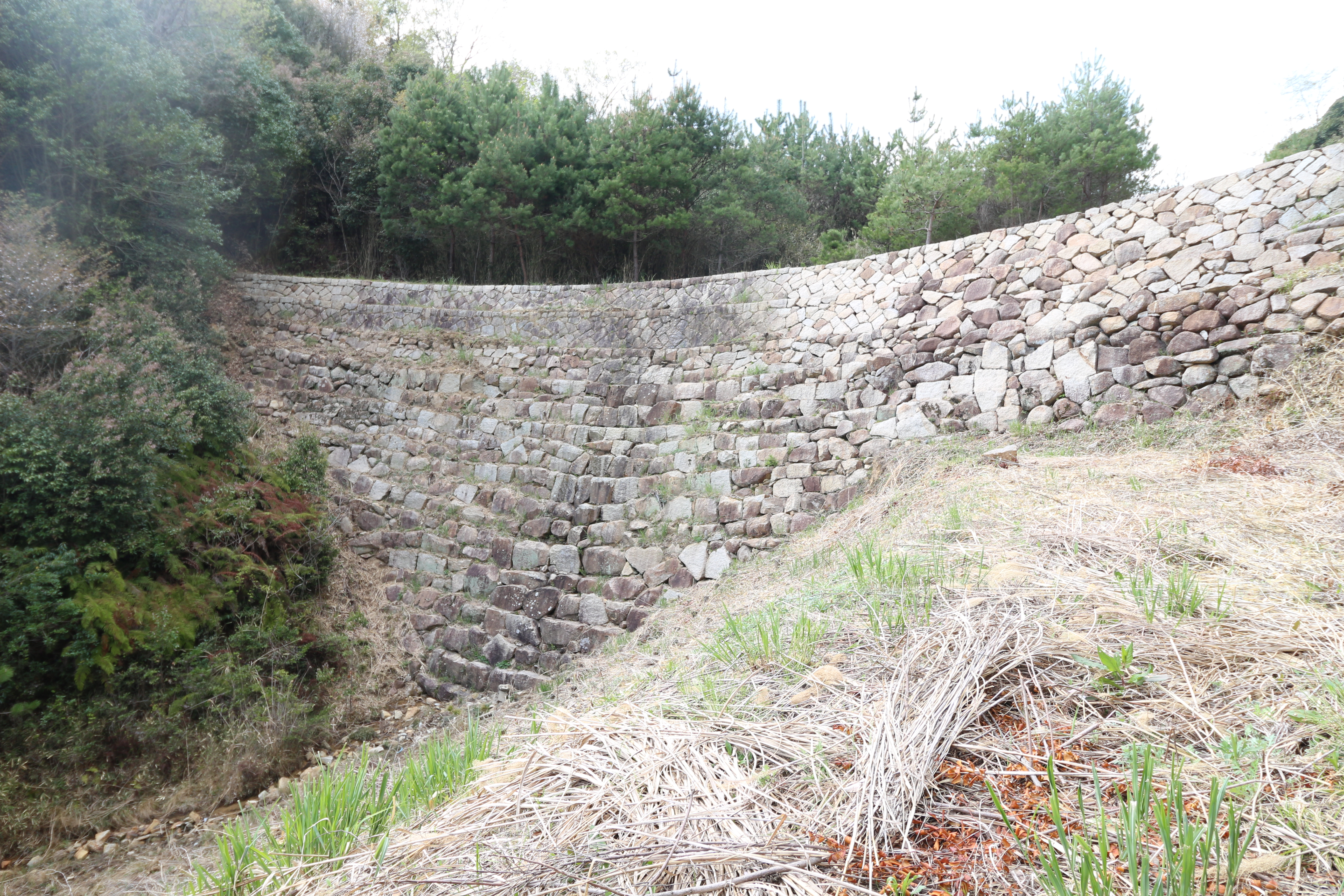 広島県福山市神辺町の堂々川砂留群にある鳶が迫砂留